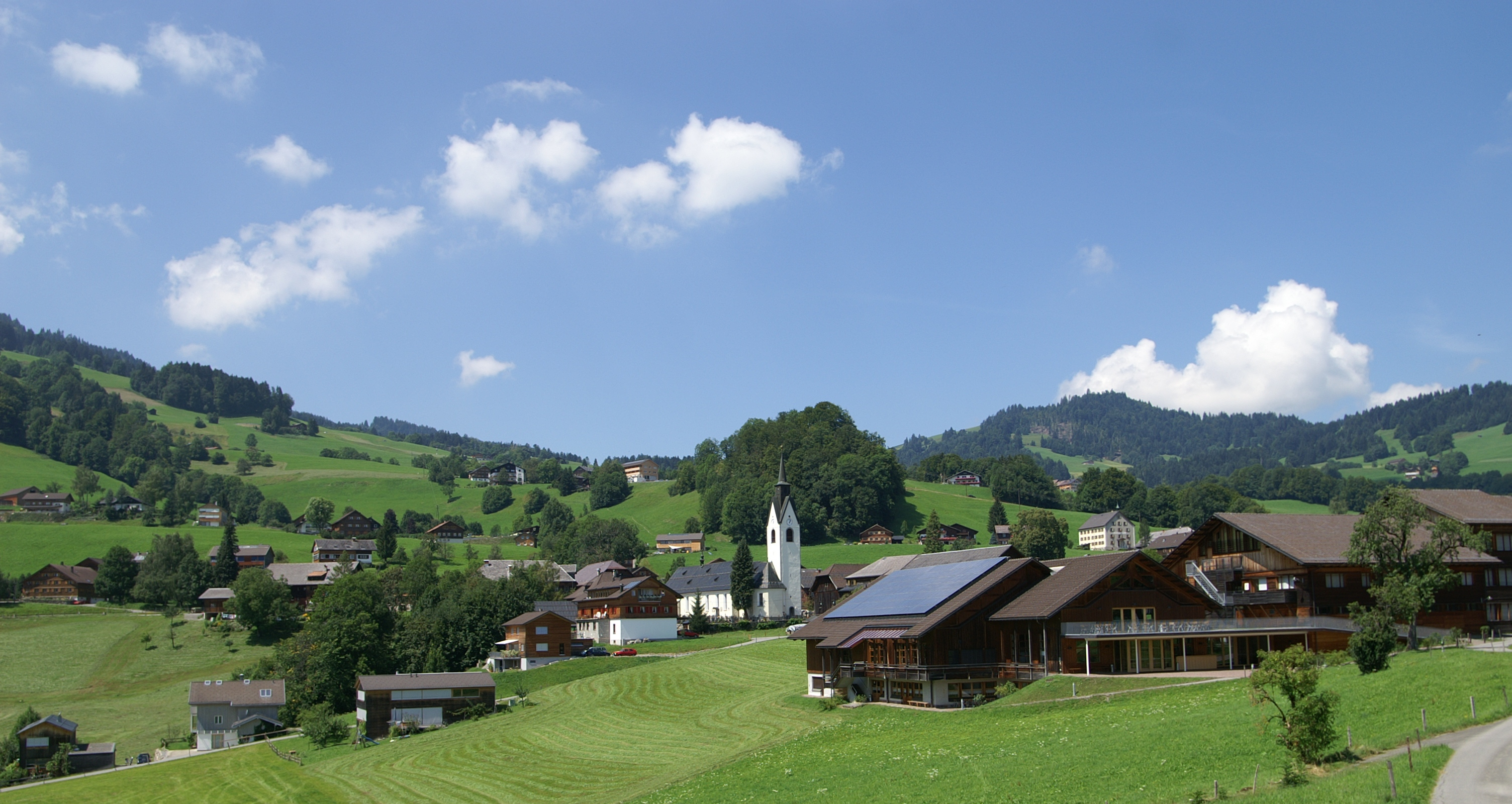 Ortsteil von Schwarzenberg im Bregenzerwald. Veröffentlicht: Georg Kessler in "Freizeit im Ländle, Die schönsten Ausflugziele in Vorarlberg ISBN 978-3-7022-3068-5 2010.